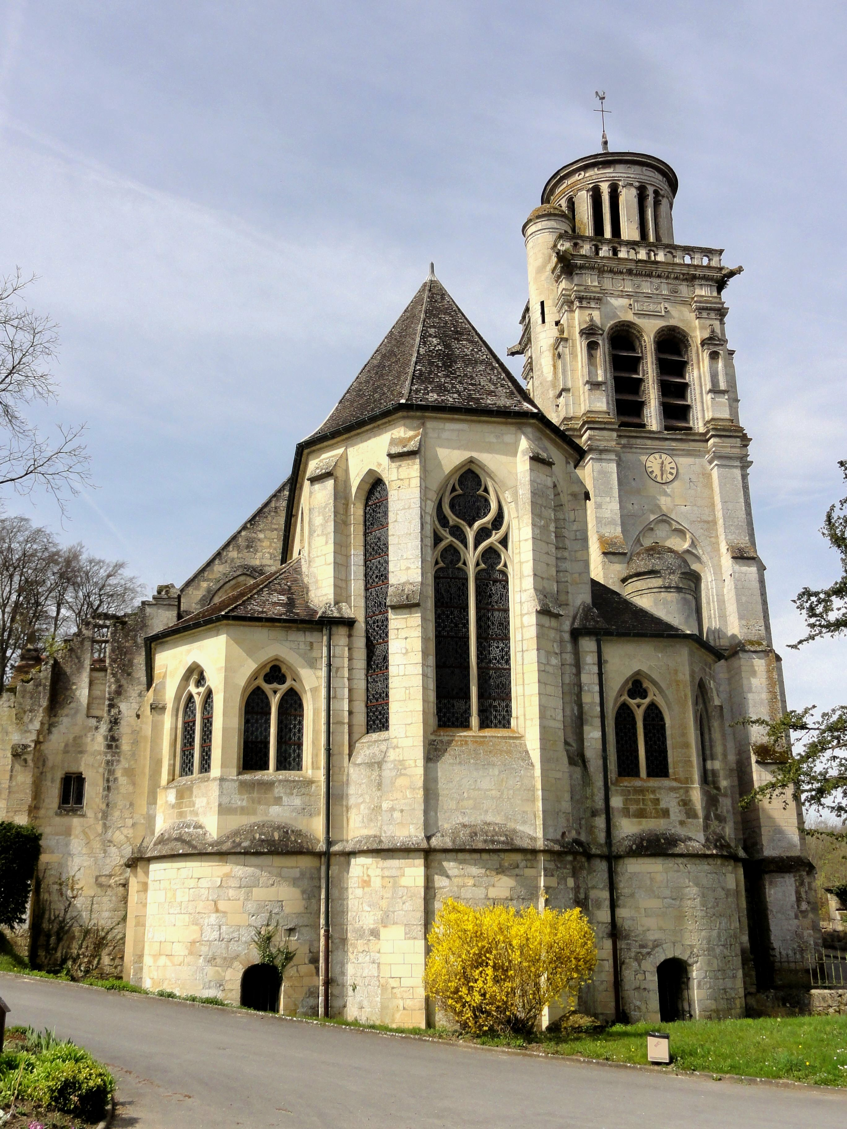 Vue sur le chevet.